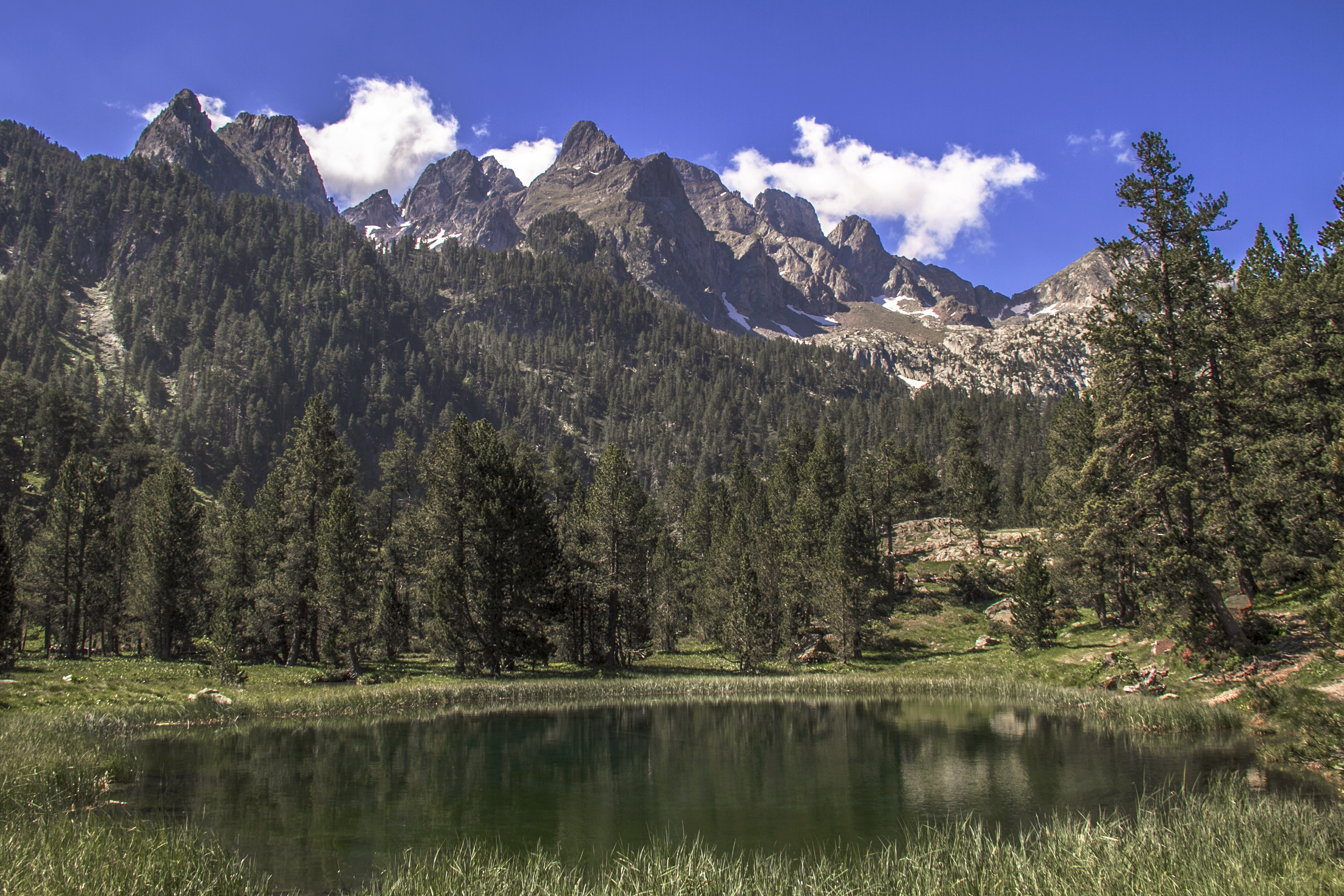 Parque natural Posets-Maladeta This is a photography of a Special Area of Conservation in Spain with the ID: ES0000149. Natura2000 entry, EEA entry